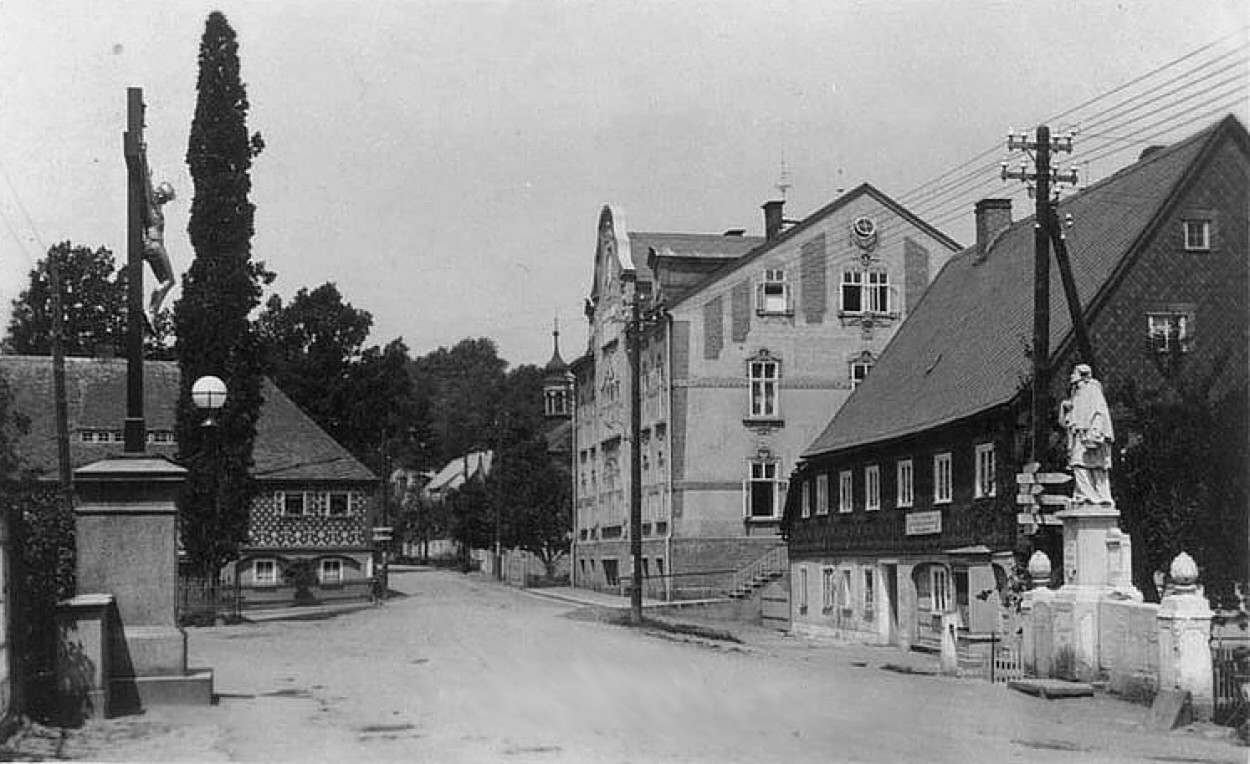 Centrum Lipové ve 20. letech 20. století. Zprava socha sv. Jana Nepomuckého, podstávkový dům, spořitelna a špitál.